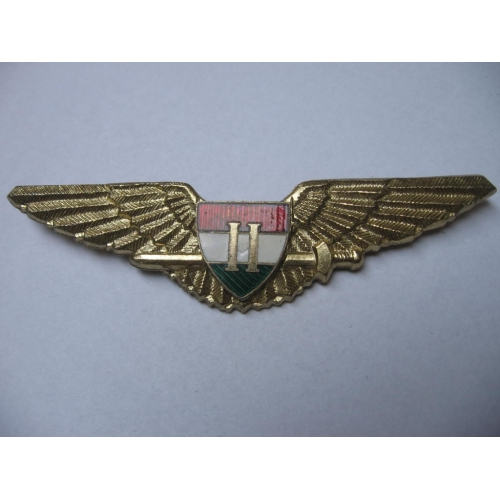 Magyar Légierő - II. osztályú repülőgépvezető